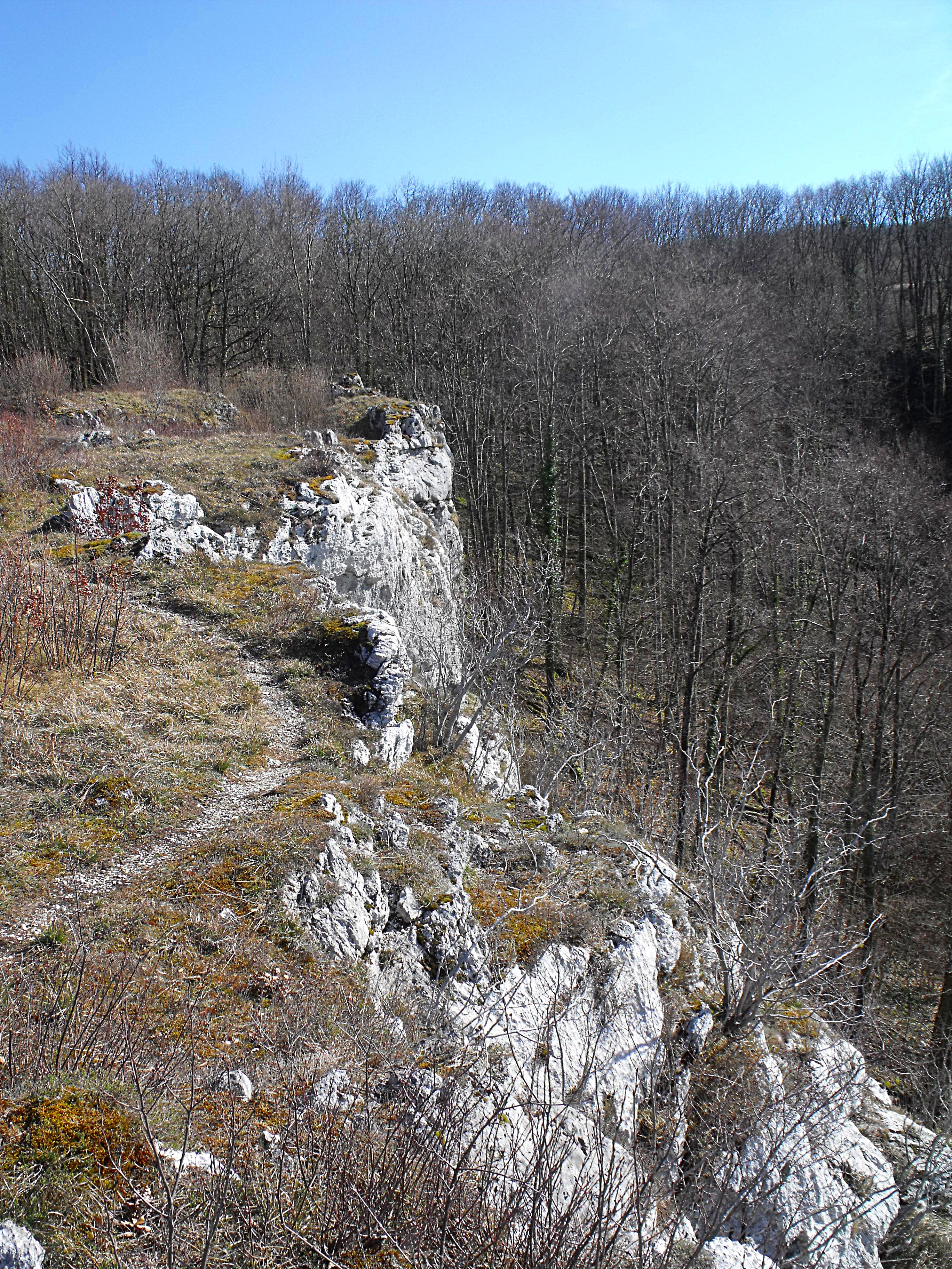 RNR du Crêt des roches, Doubs, France